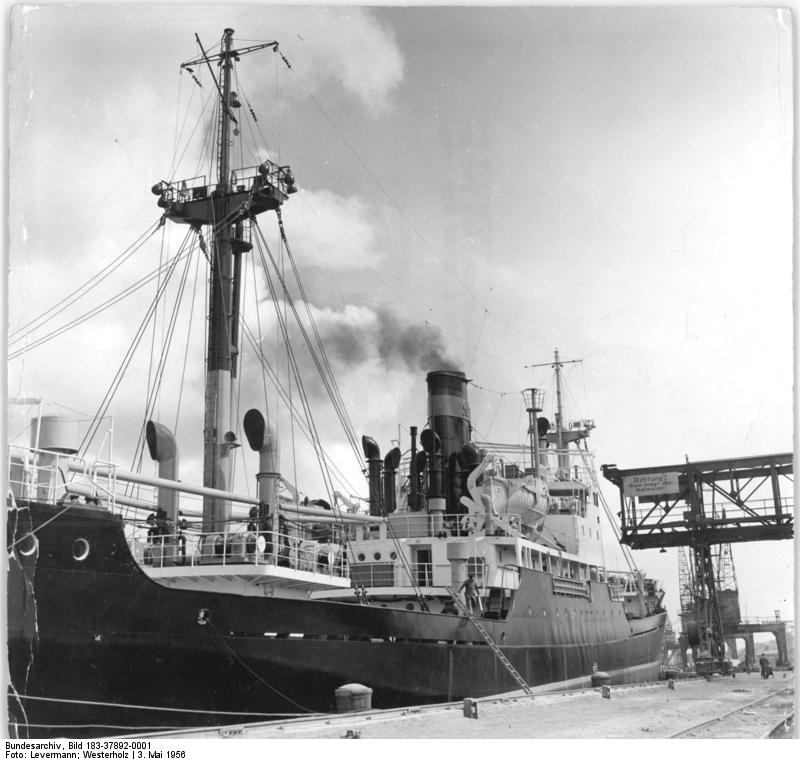 Rostock, Hafen, Frachter Zentralbild Levermann-Westerholz-3.5.1956 We-Sch.- Im Rostocker Hafen. UBz: Ein neuer 3.000 Tonnen-Frachter, der auf der Neptun-Werft gebaut wurde, fertig zum Auslaufen.